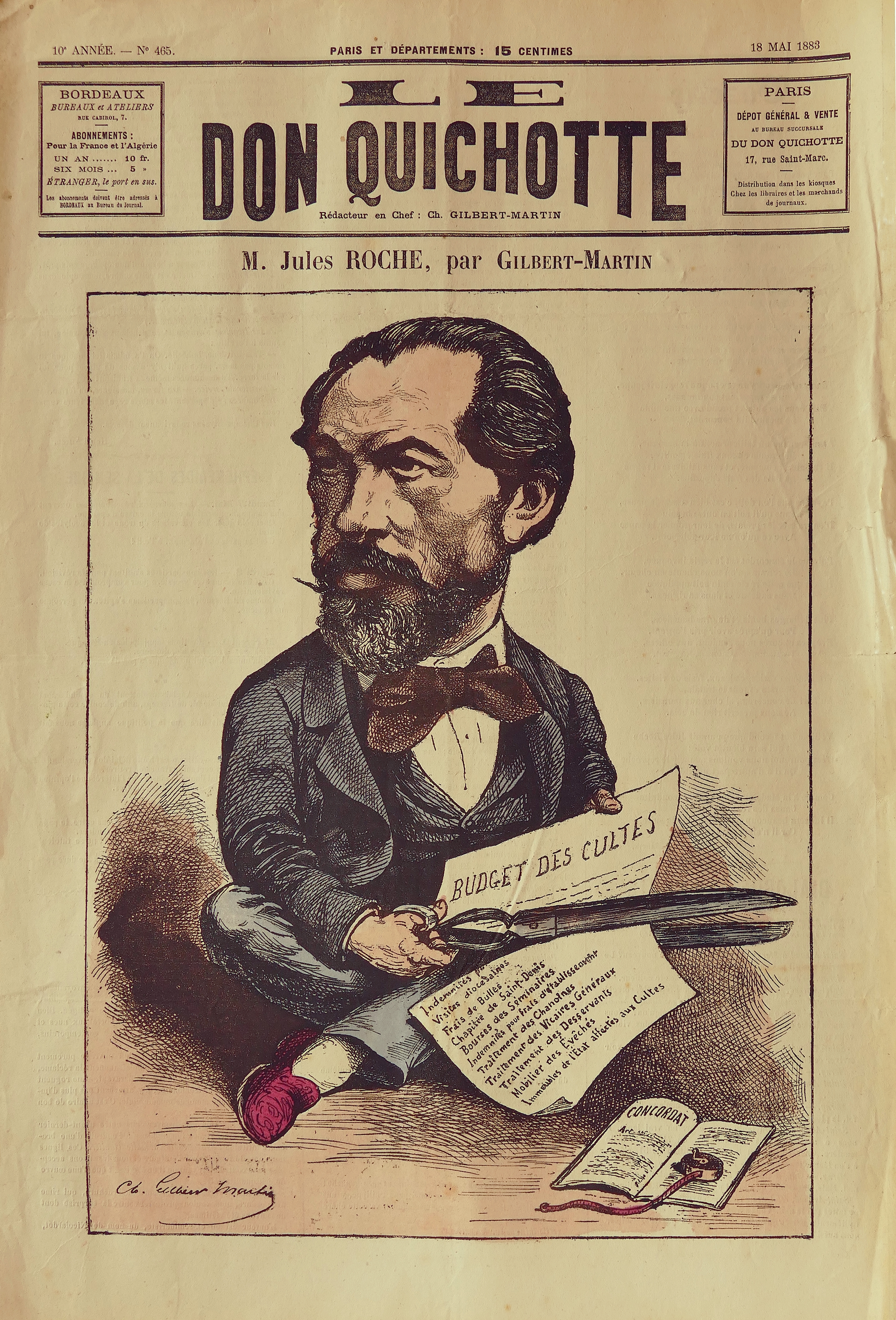 Le Don Quichotte n°465 du 18 mai 1883, Jules Roche, dessin de Charles Gilbert-Martin. Dimensions originale : 33,5 x 48,5 cm.